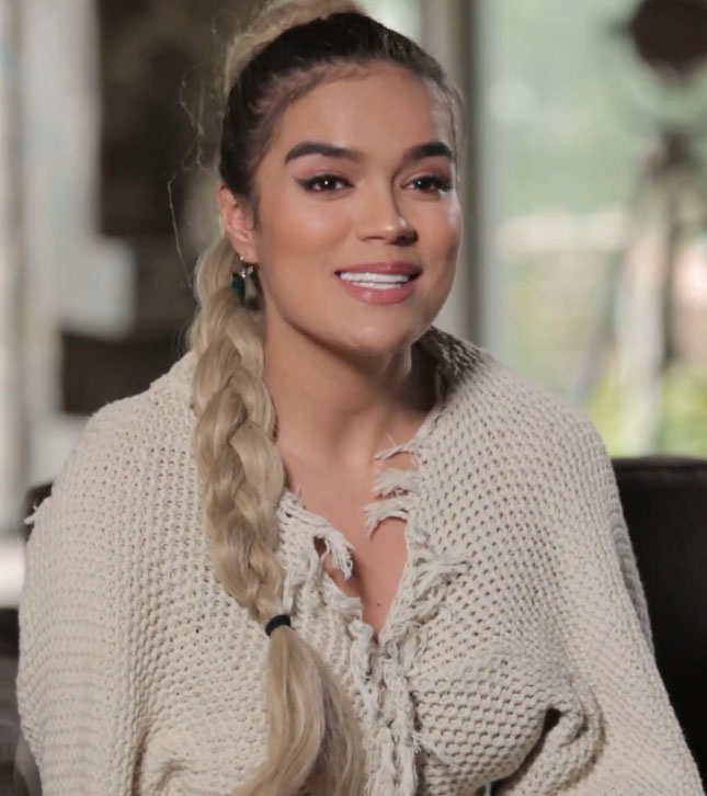 Karol G en una entrevista para Telemedellin